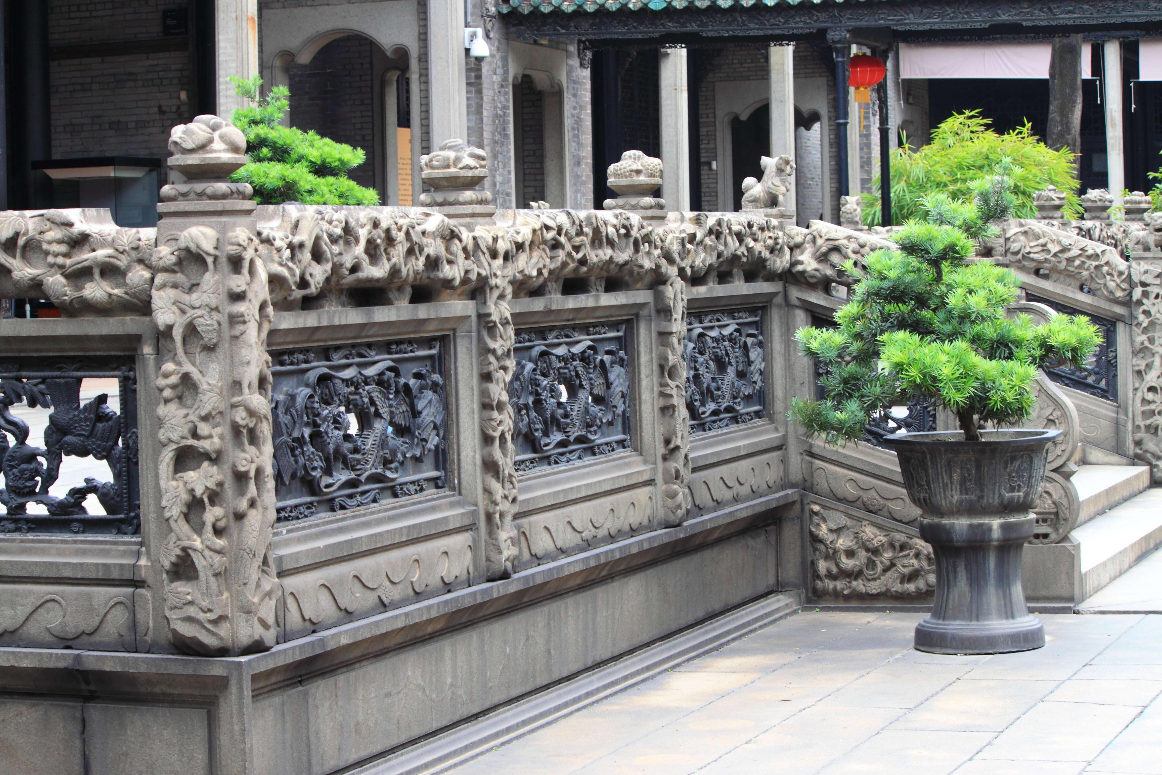 广州陈家祠堂 —— 石栏杆